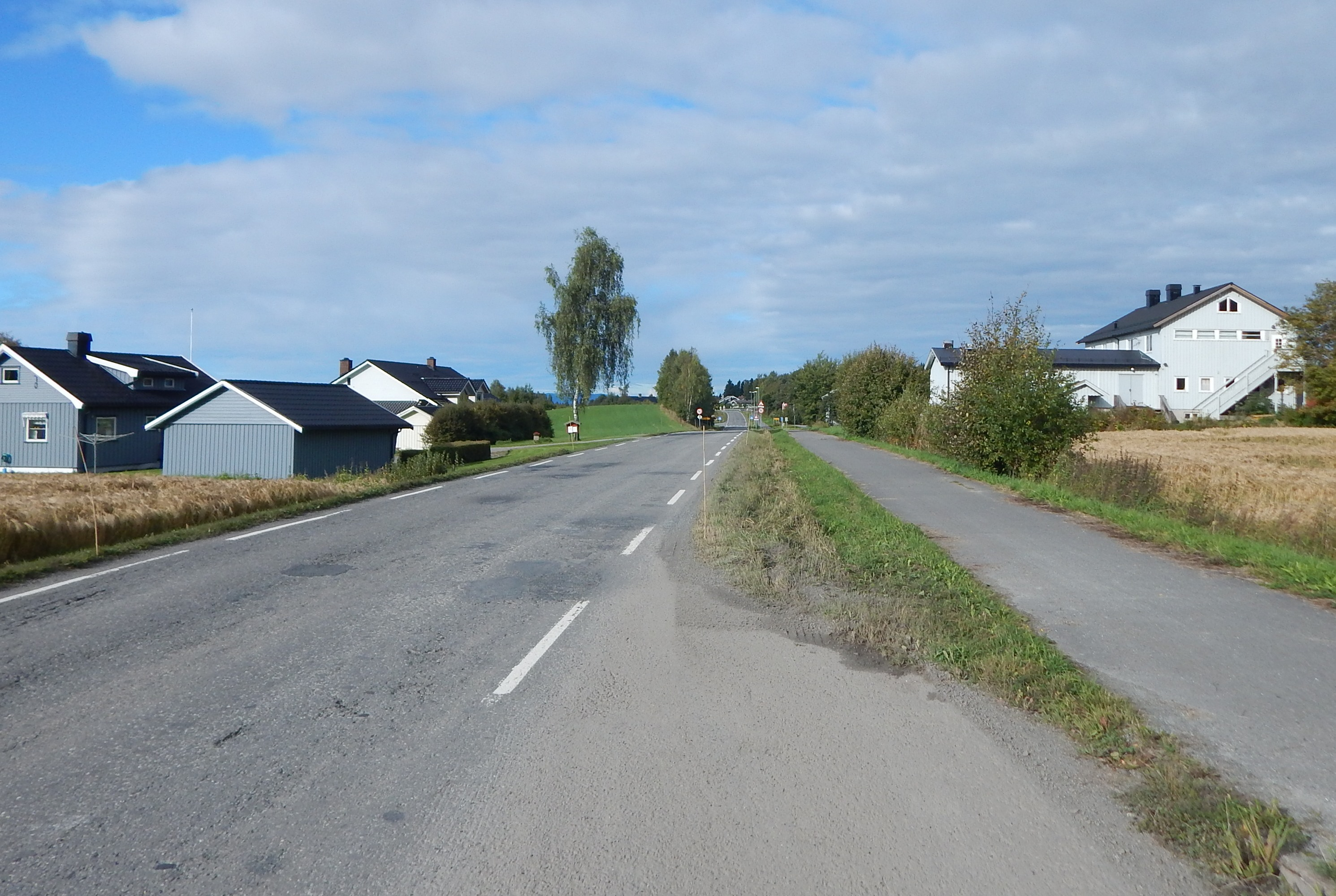 Fartvegen (fylkesvei 227, tidl. 60) inn mot Slemsrud (Øvre Vang) østfra